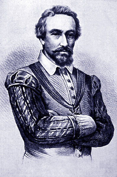 Dalmau de Queralt, conde de Santa Coloma